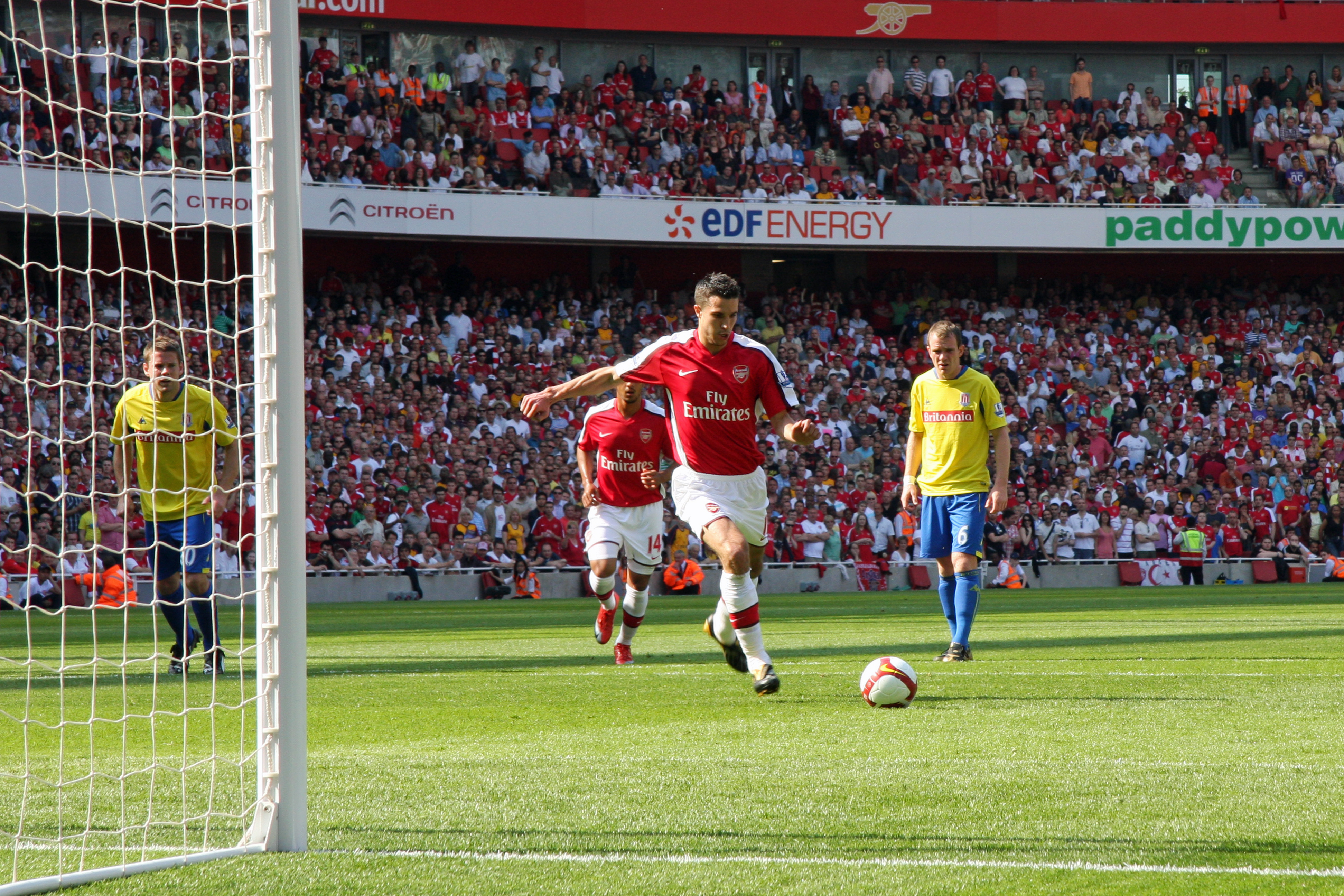 Robin van Persie in 2009